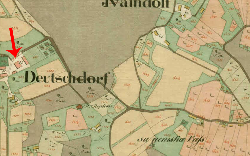 Franciscejski kataster za Kranjsko, 1823-1869